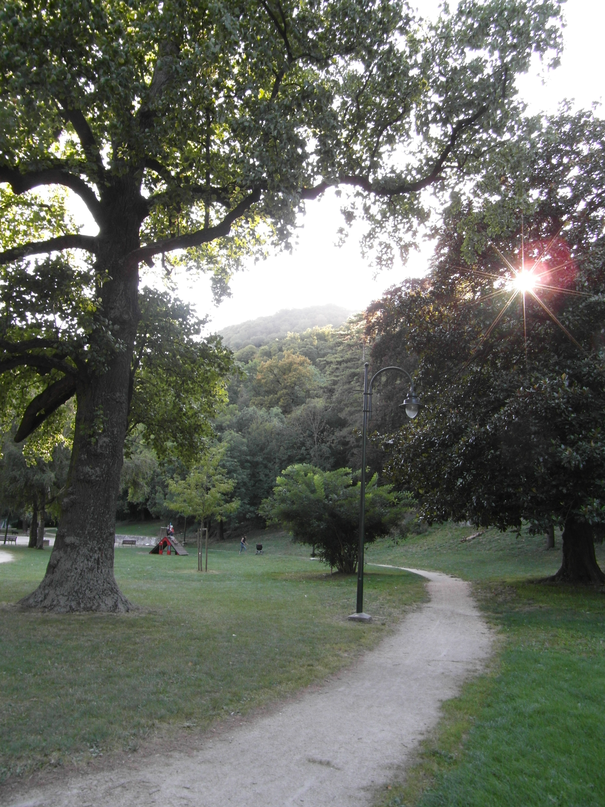 Parc Karl Marx